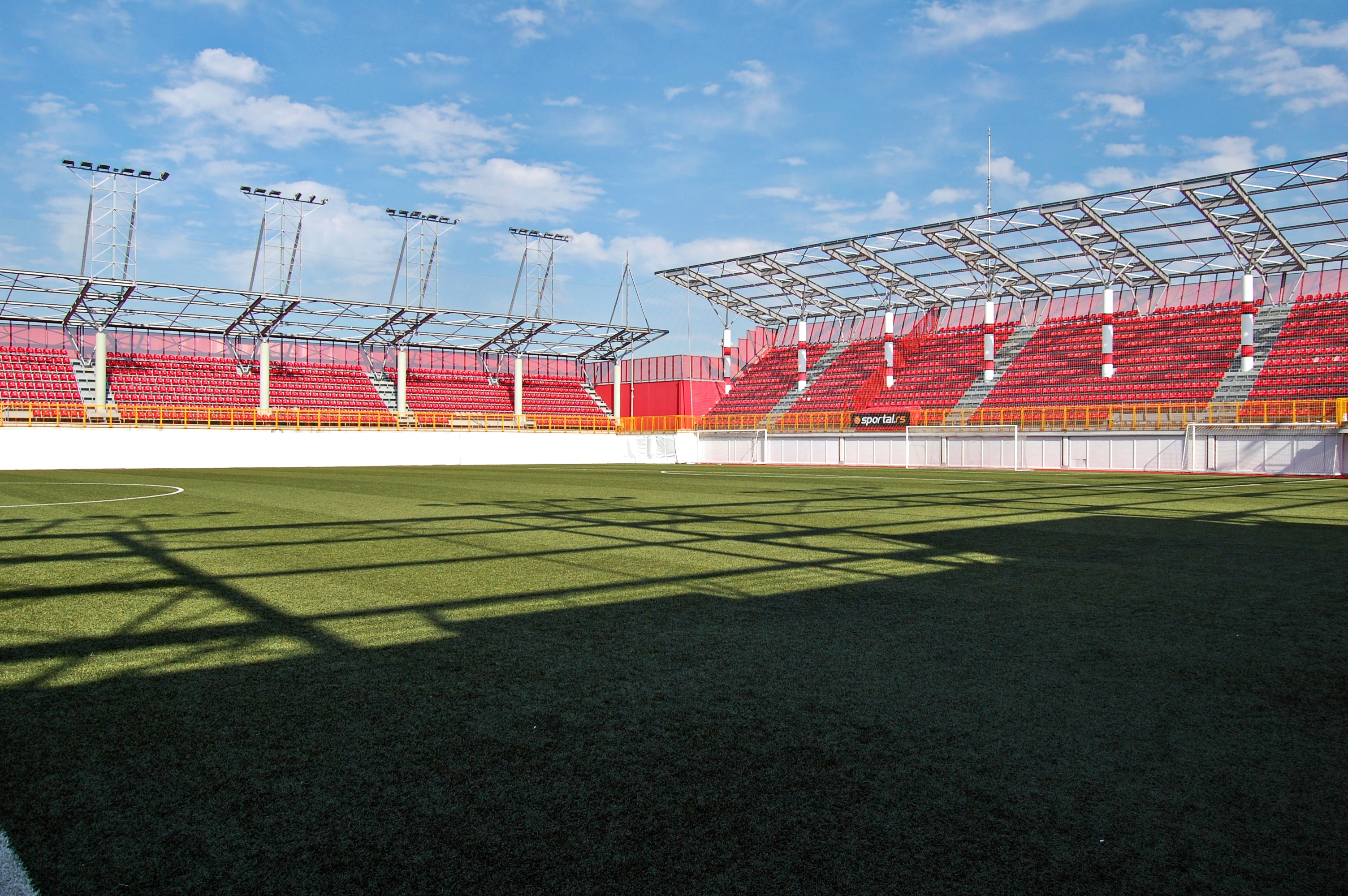 trzni centar Stadion